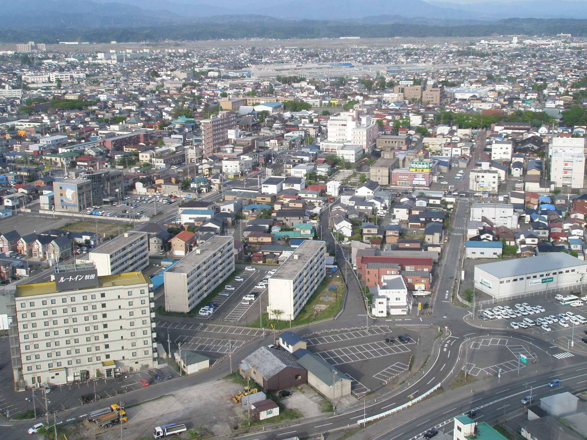 秋田ポートタワー・セリオン展望台からの眺め。土崎地区市街地方向